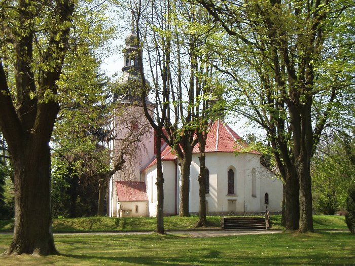 Kostel sv. Jakuba Většího, Štoky Church in Štoky, Vysočina region, Czech republic